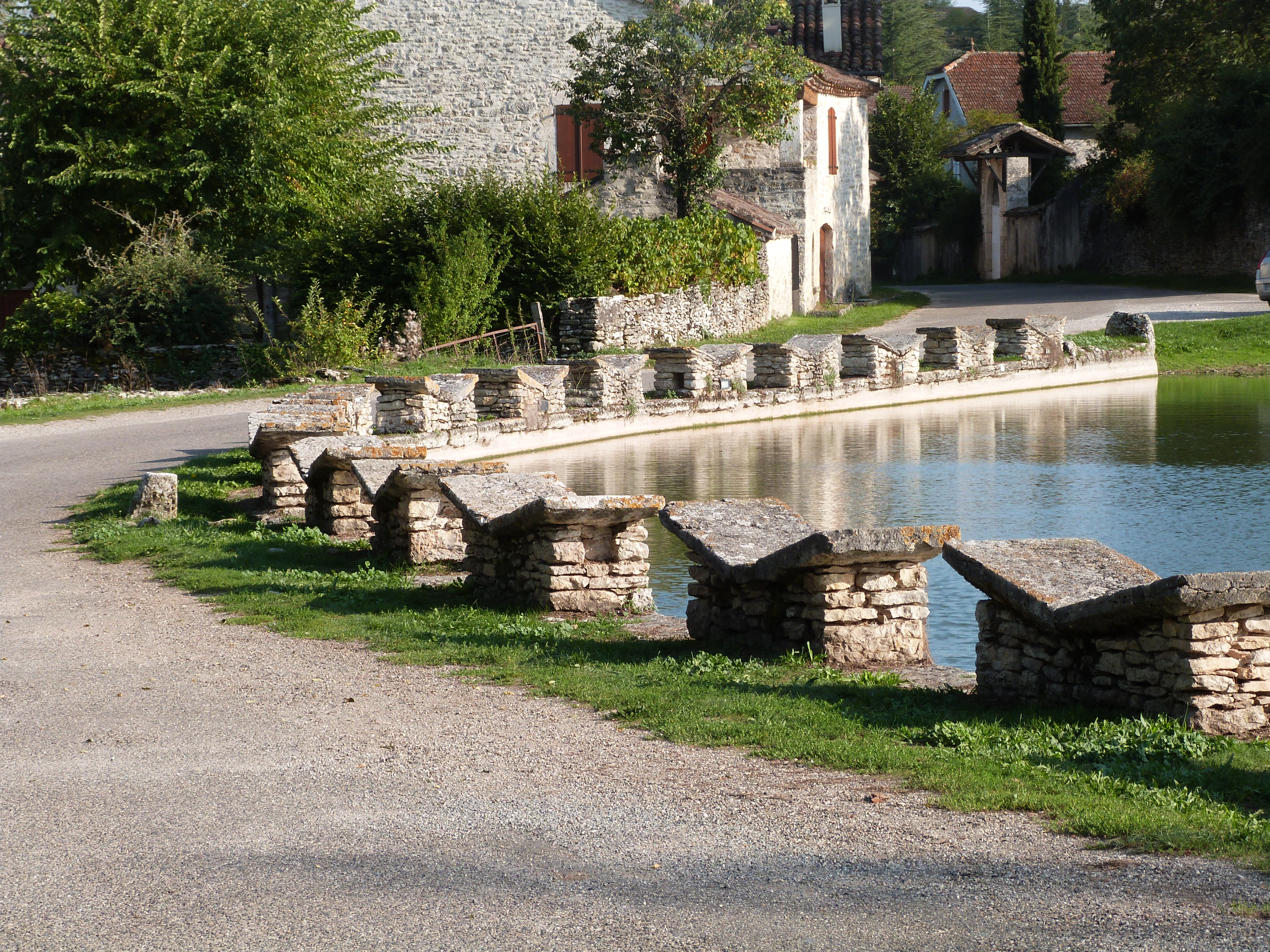 Lavoirs papillons d'Aujols (Lot)